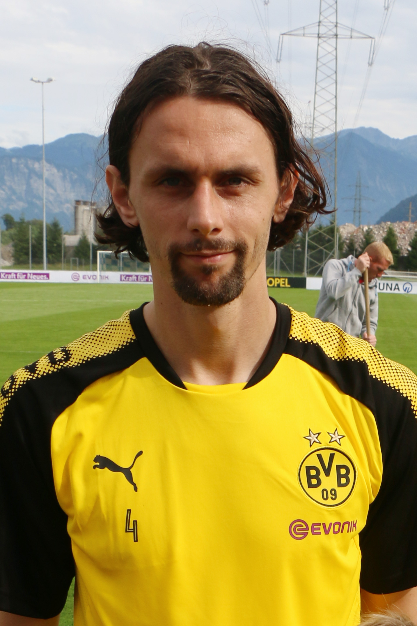 Neven Subotic im BVB Trainingslager in Bad Ragaz 2017